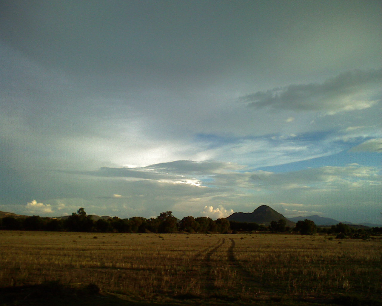 Epazoyucan, Hidalgo, México